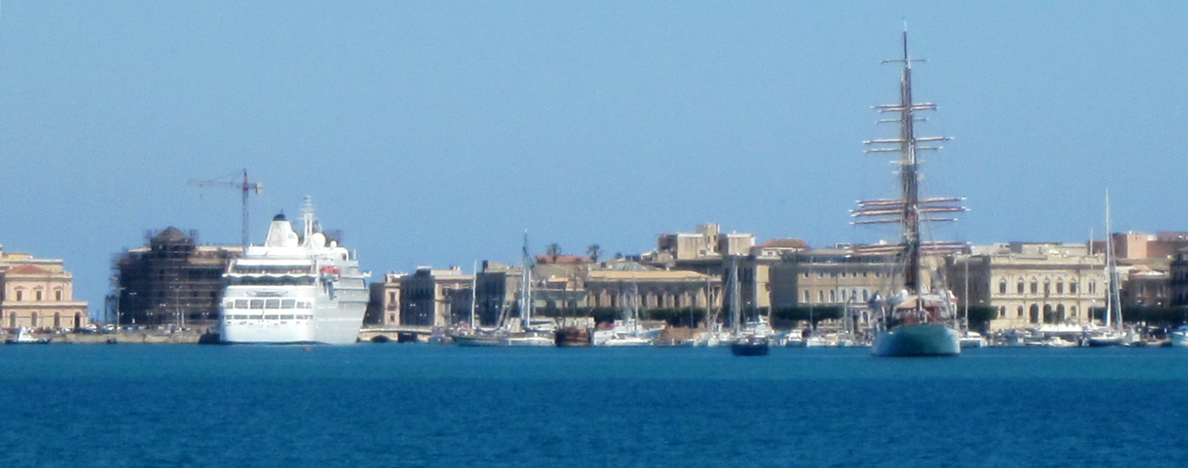 Il Porto Grande di Siracusa